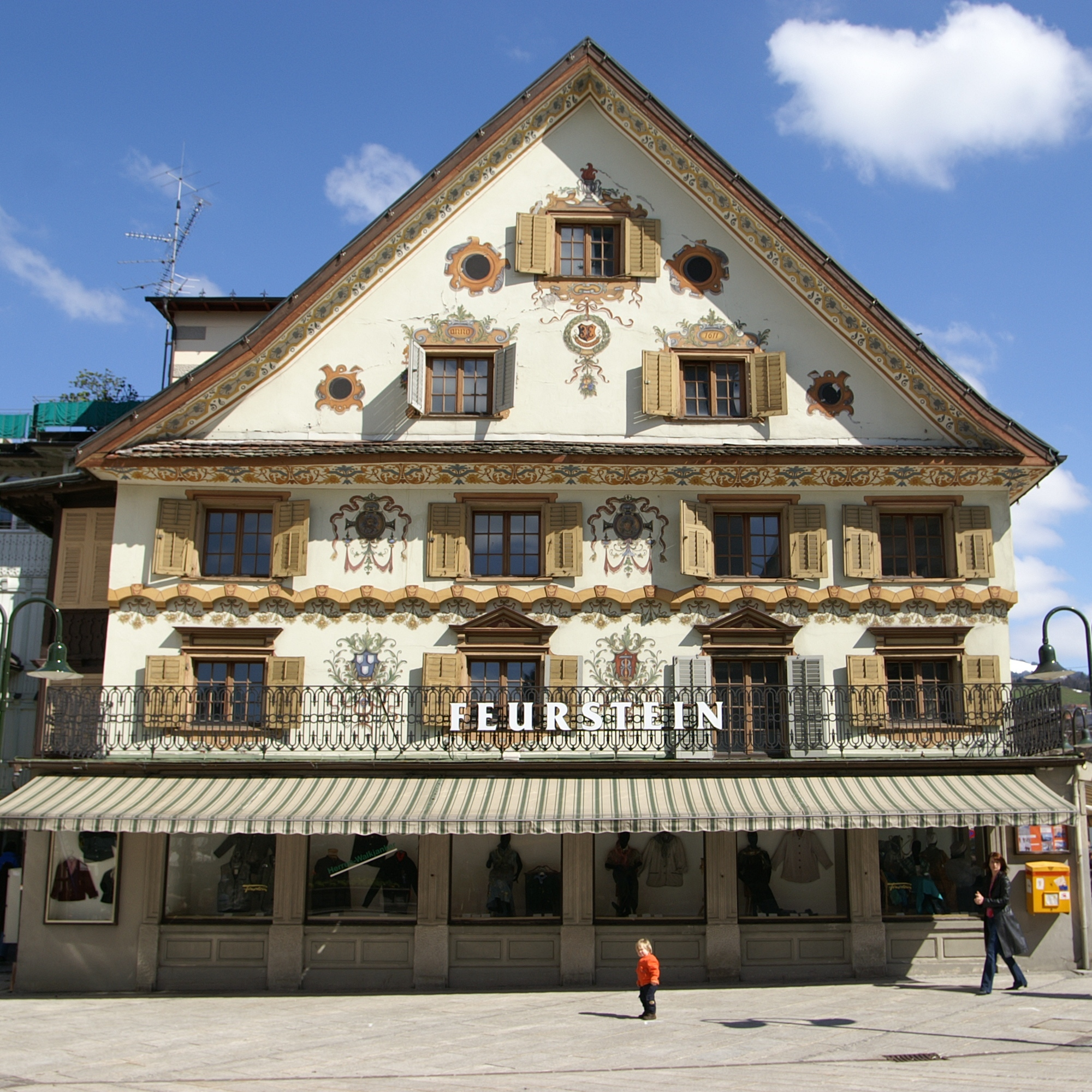 aus dem DEHIO Vorarlberg 1983: Dornbirn Marktplatz Nr.8 erbaut 1611, renoviert 1858, 1897, restauriert 1951, 1984; 3geschossig, Neorenaissance-Dekormalerei, Klebdach; ebenerdig zum Platz vorgesetzt Geschäftszone.